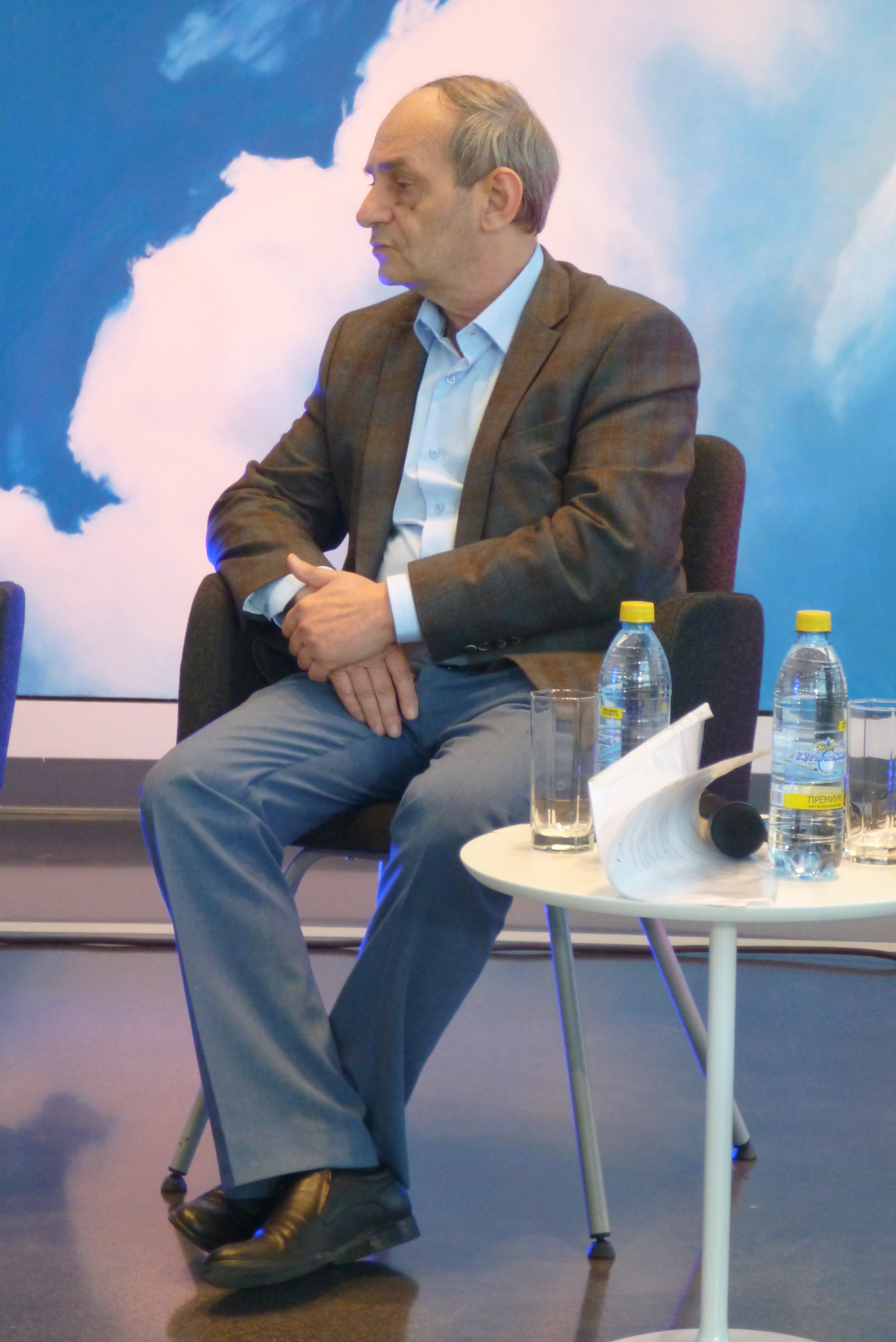 Владимир Семёнович Гуревич в Ельцин-центре 30 мая 2019 года